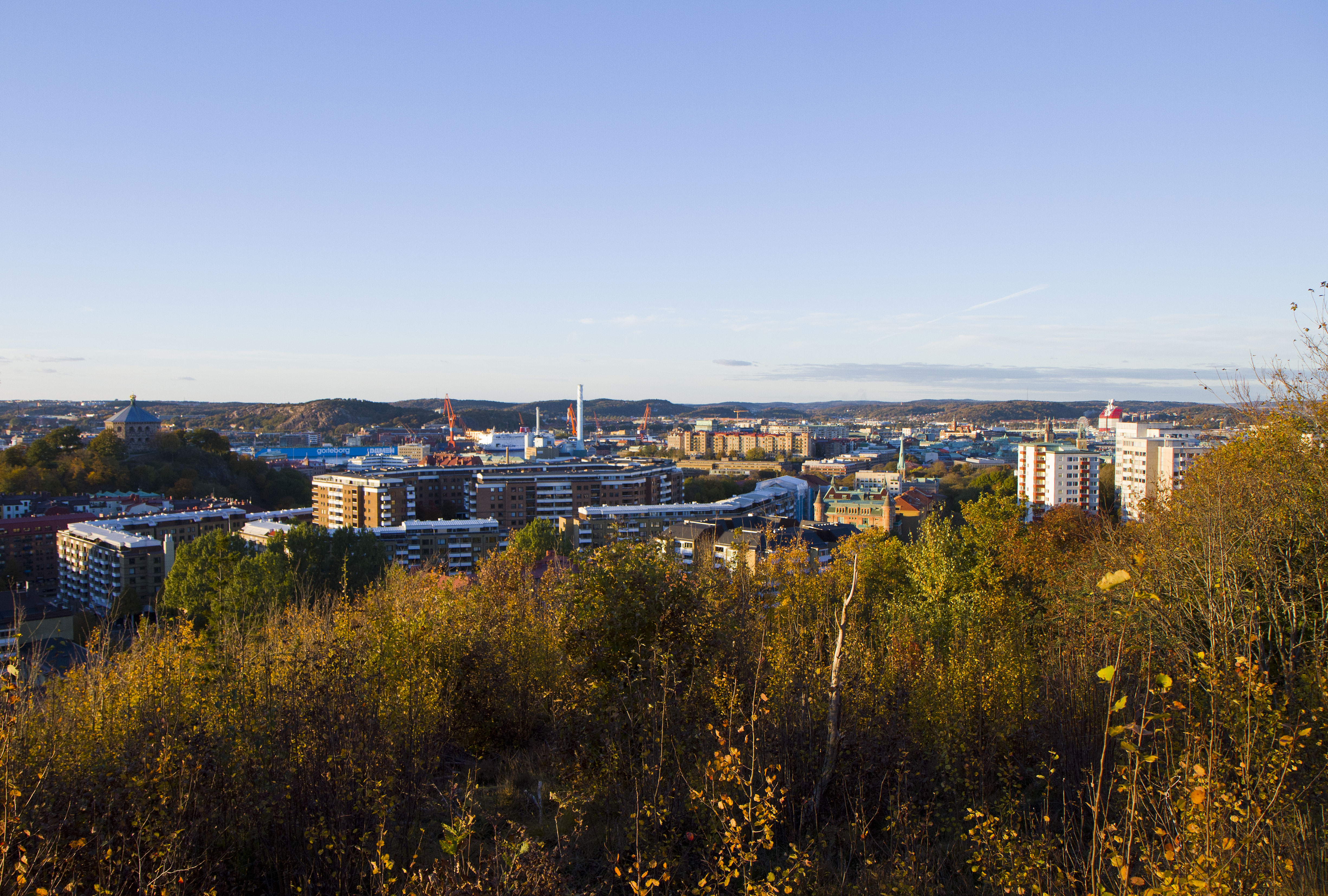 Vy över centrala Göteborg, oktober 2010